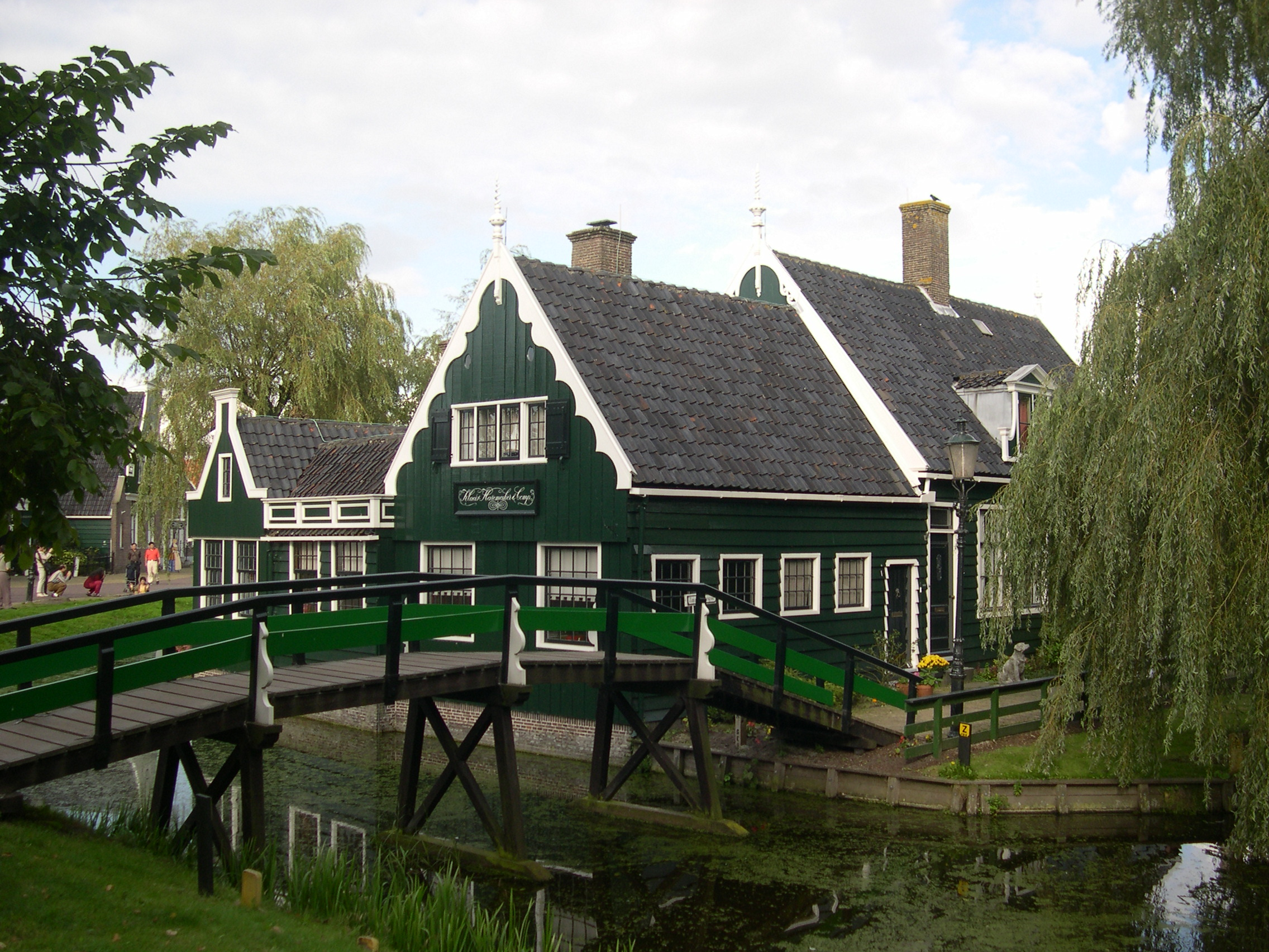 Gebouw op de Zaanse Schans